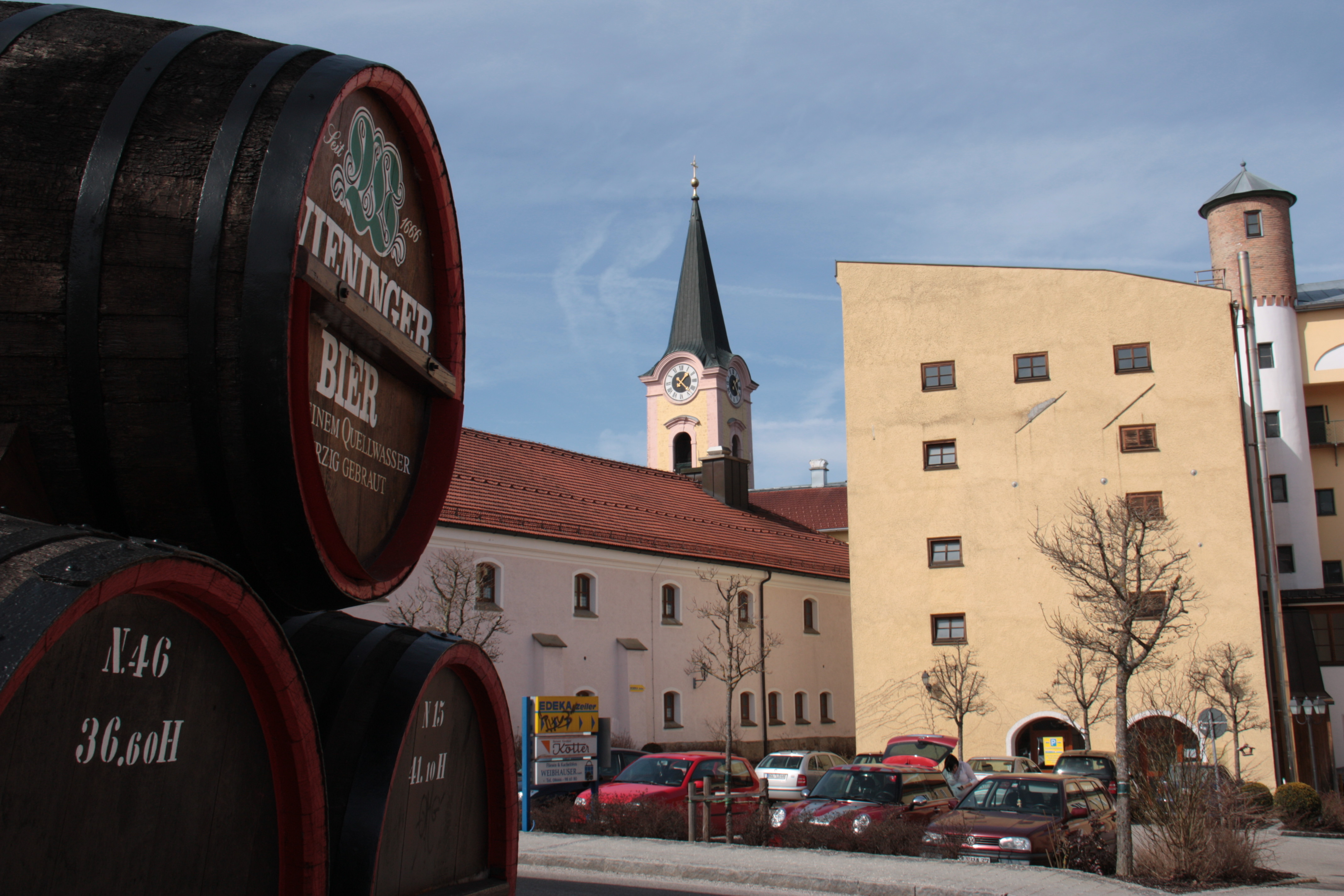 Blick von der Brauerei auf die Teisendorfer Kirche